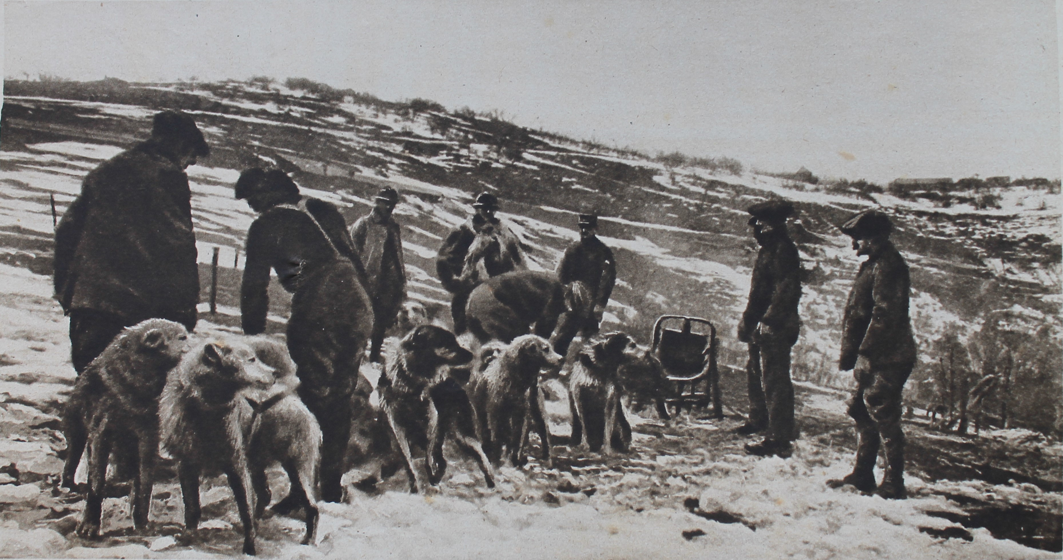 Chiens d'Alaska sur les crêtes des Vosges 1914-18.